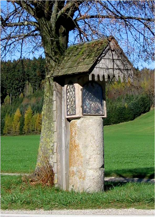 Bildstock auf römischem Meilenstein, Traunstein Ortsteil Wolkersdorf, Kraimoser Feld.Der Sockel eines Bildstockes bei Kraimoos wurden 1840 als Meilenstein erkannt. Nachforschungen ergaben, daß der Stein sich noch 1780 an Friedhofsmauer von Erlstätt befand. Ein Bauer aus Schmidham hat ihn erworben und am heutigen Standort unweit der ehemaligen Römerstrasse Via Julia aufgestellt.